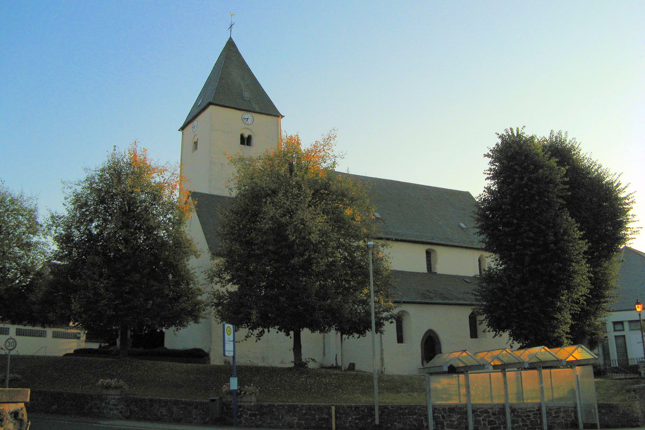 Romanische Pfeilerbasilika in Waldbrunn Lahr (Nordseite)